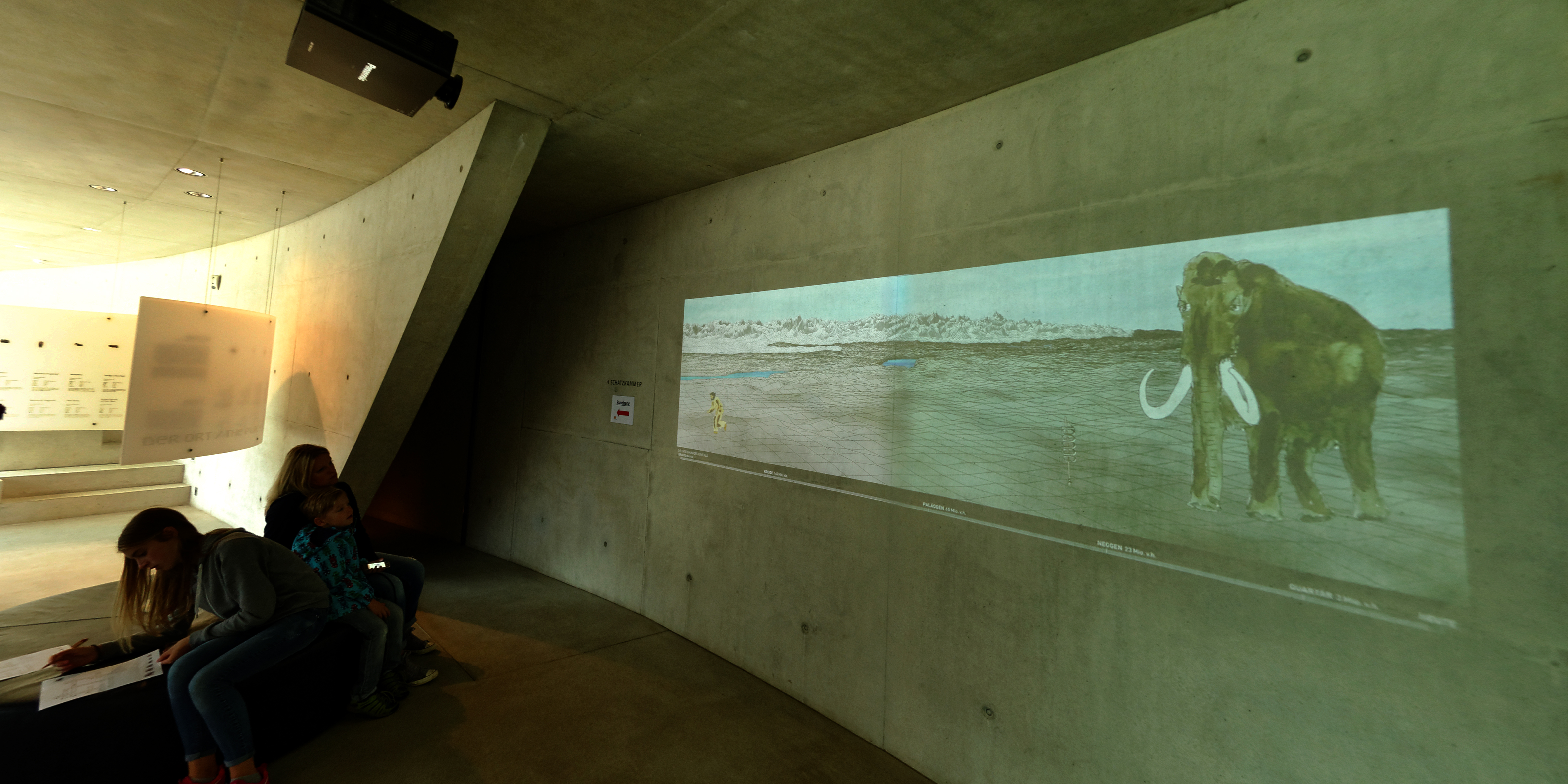 Der Archäopark Vogelherd an der Vogelherdhöhle auf der Schwäbischen Alb.